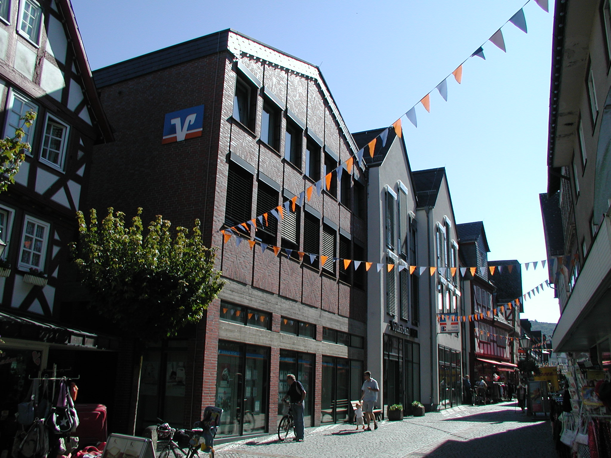 Hauptstelle in Dillenburg, Ansicht aus der Fußgängerzone